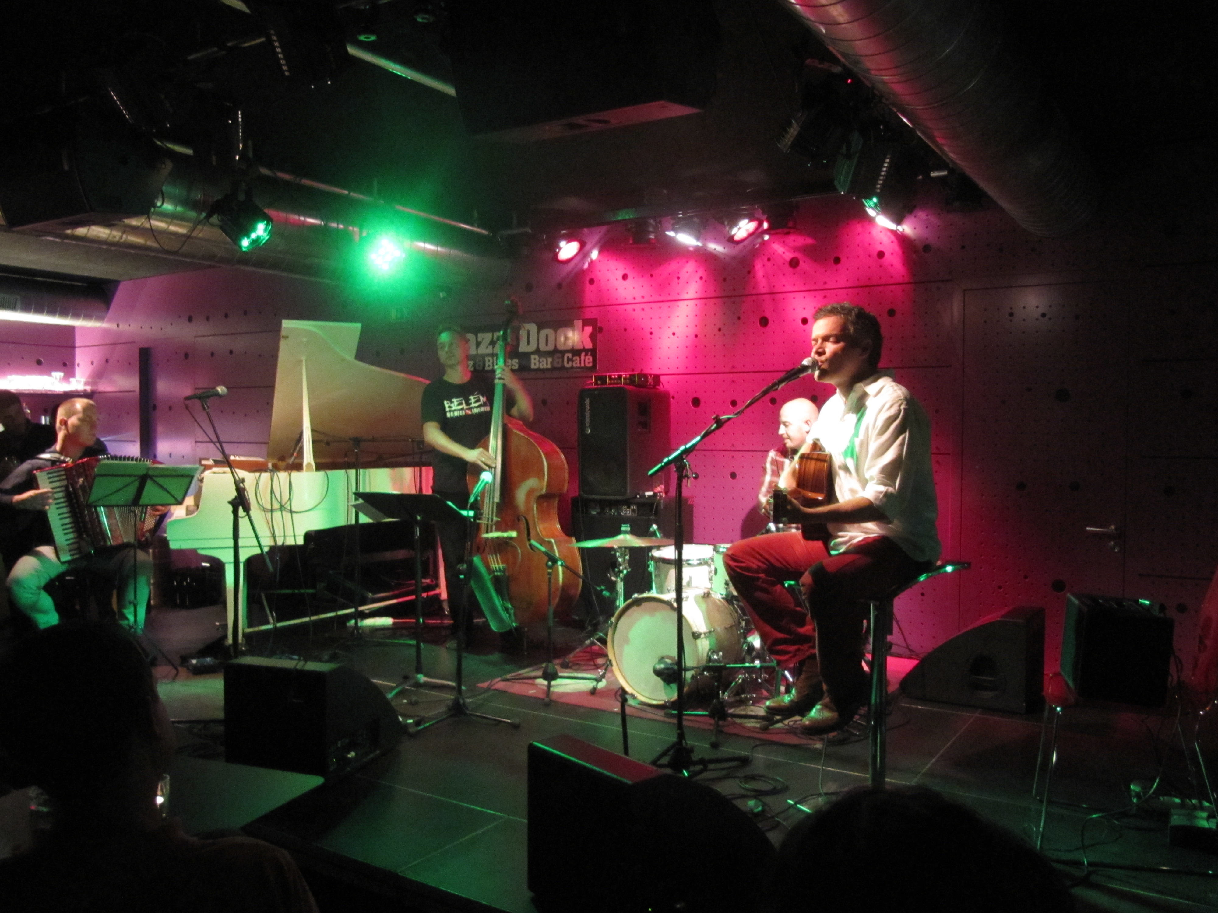 Iván Gutiérrez v Praze 2013